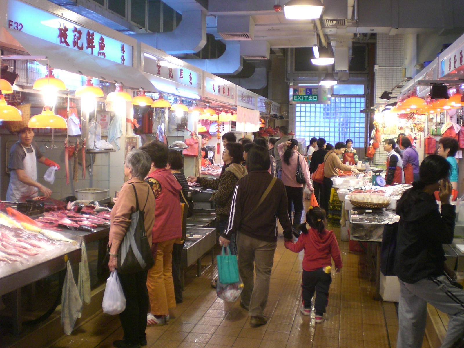 Sai Ying Pun Market 西營盤街市